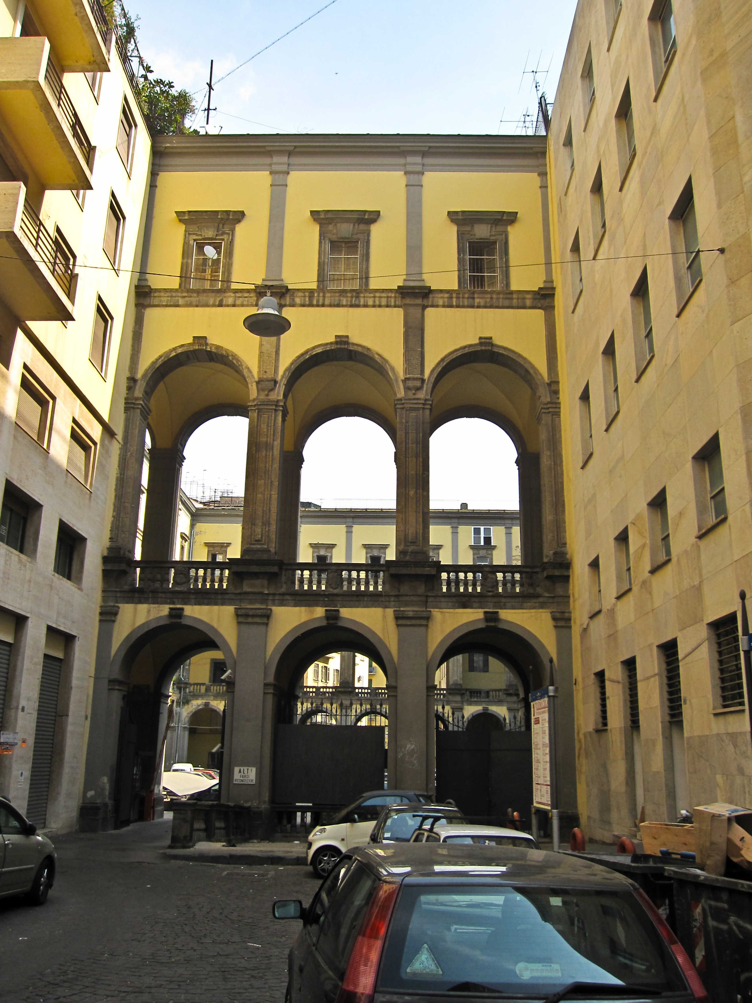 Il Chiostro principale visto da Via Cesare Battisti.